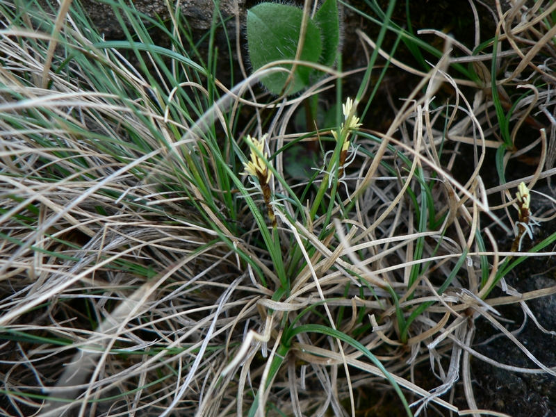 Ostřice skalní (Carex rupestris) na Červené hoře, Hrubý Jeseník.